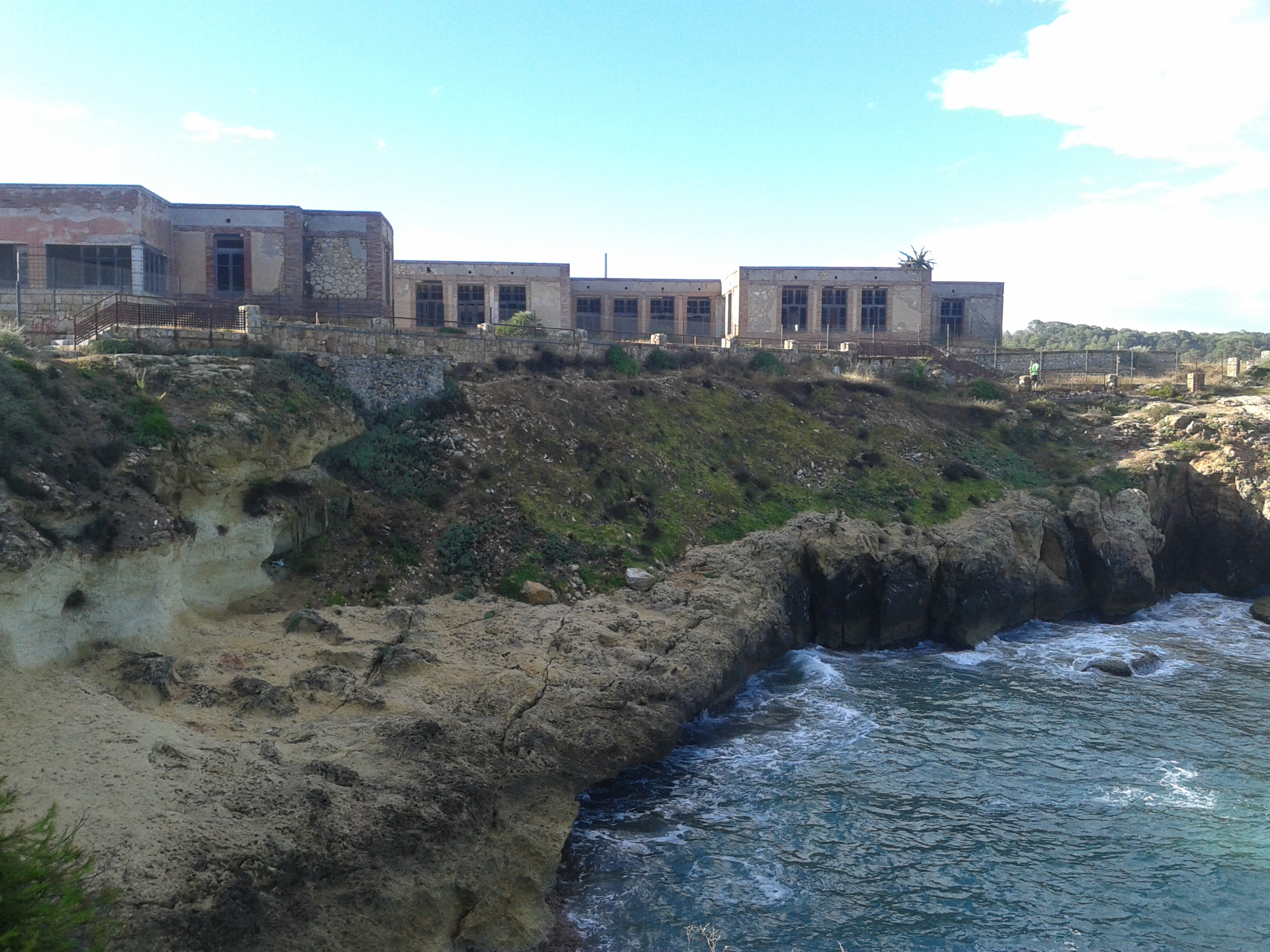 Expreventori de la Savinosa (Tarragona)